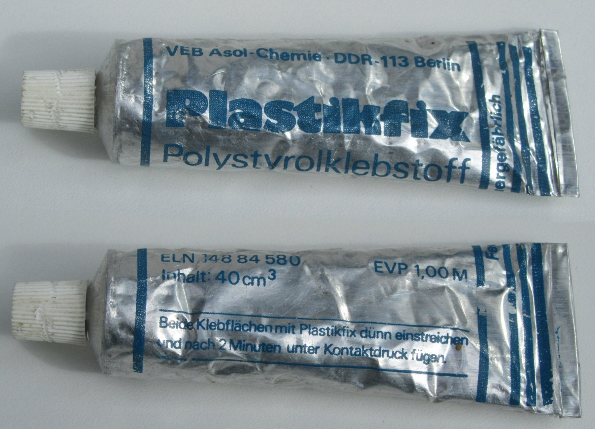 Plastikfix,VEB Asol-Chemie DDR-113 Berlin , Länge 112 mm Ø 25 mm